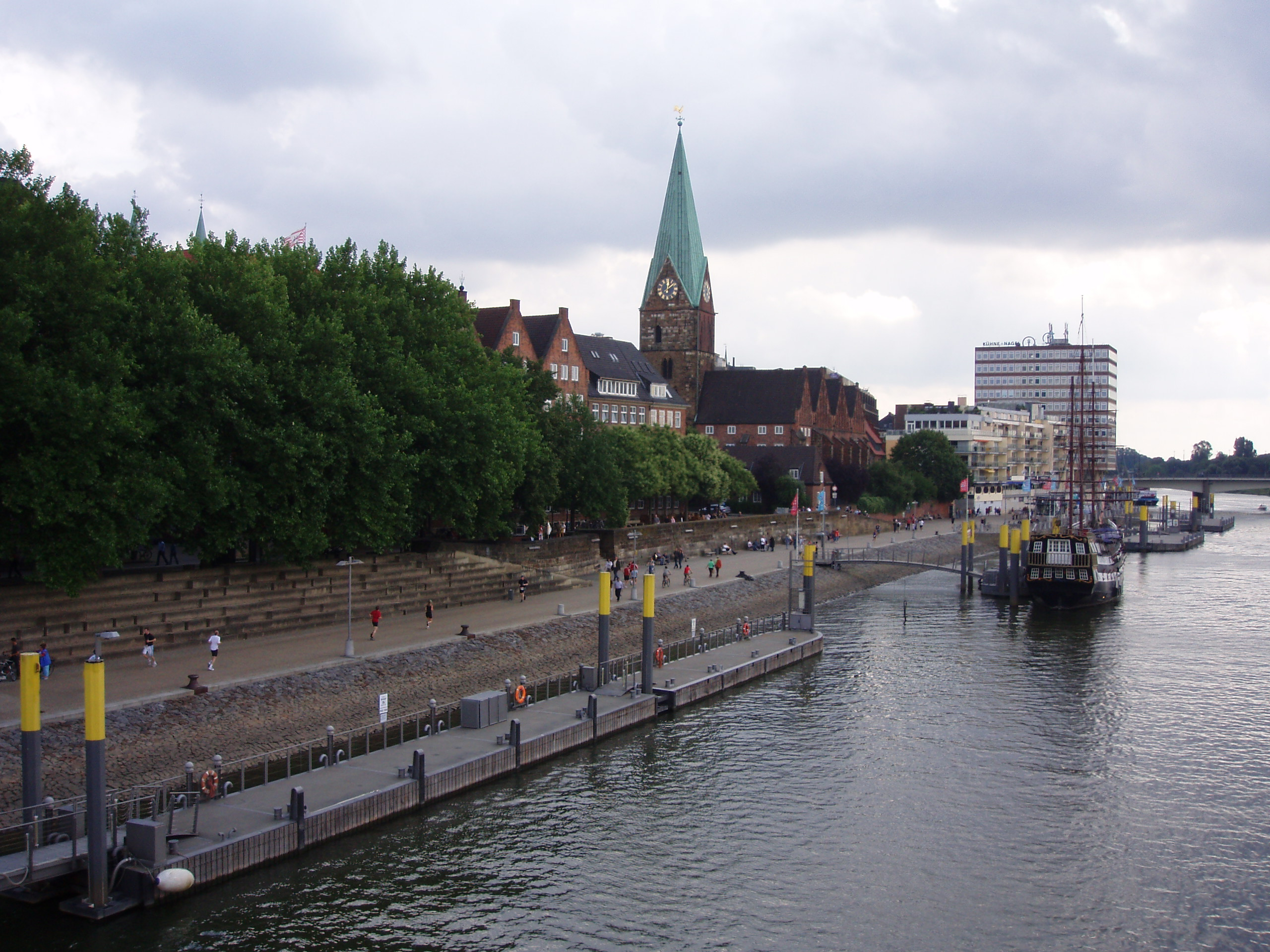 Fußgängerbrücke über die Weser, Schlachteblick